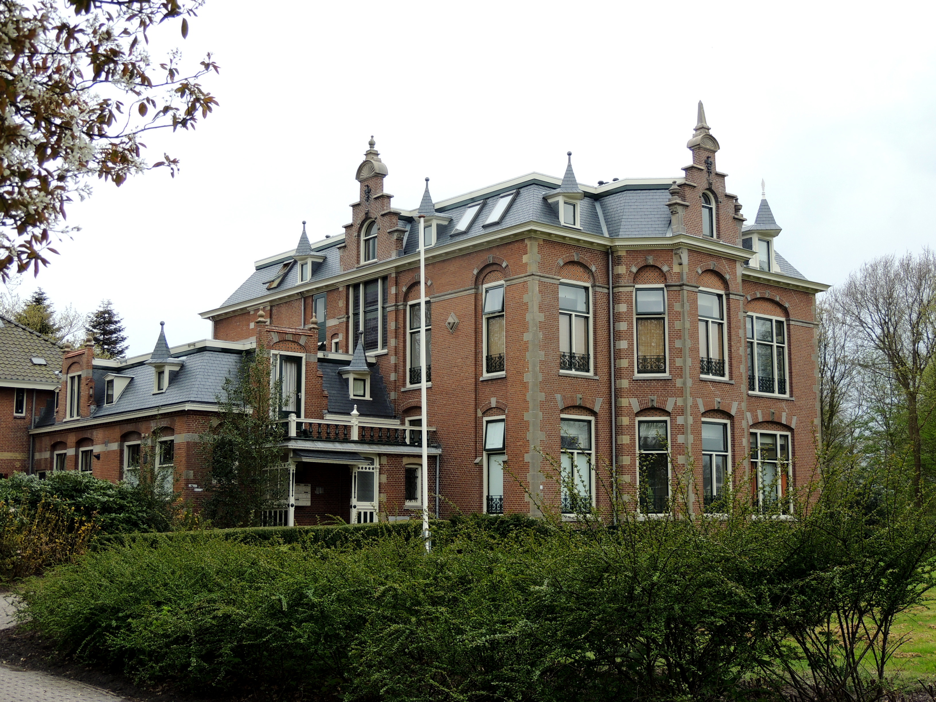 DeTalma Hoeve Feanwouden